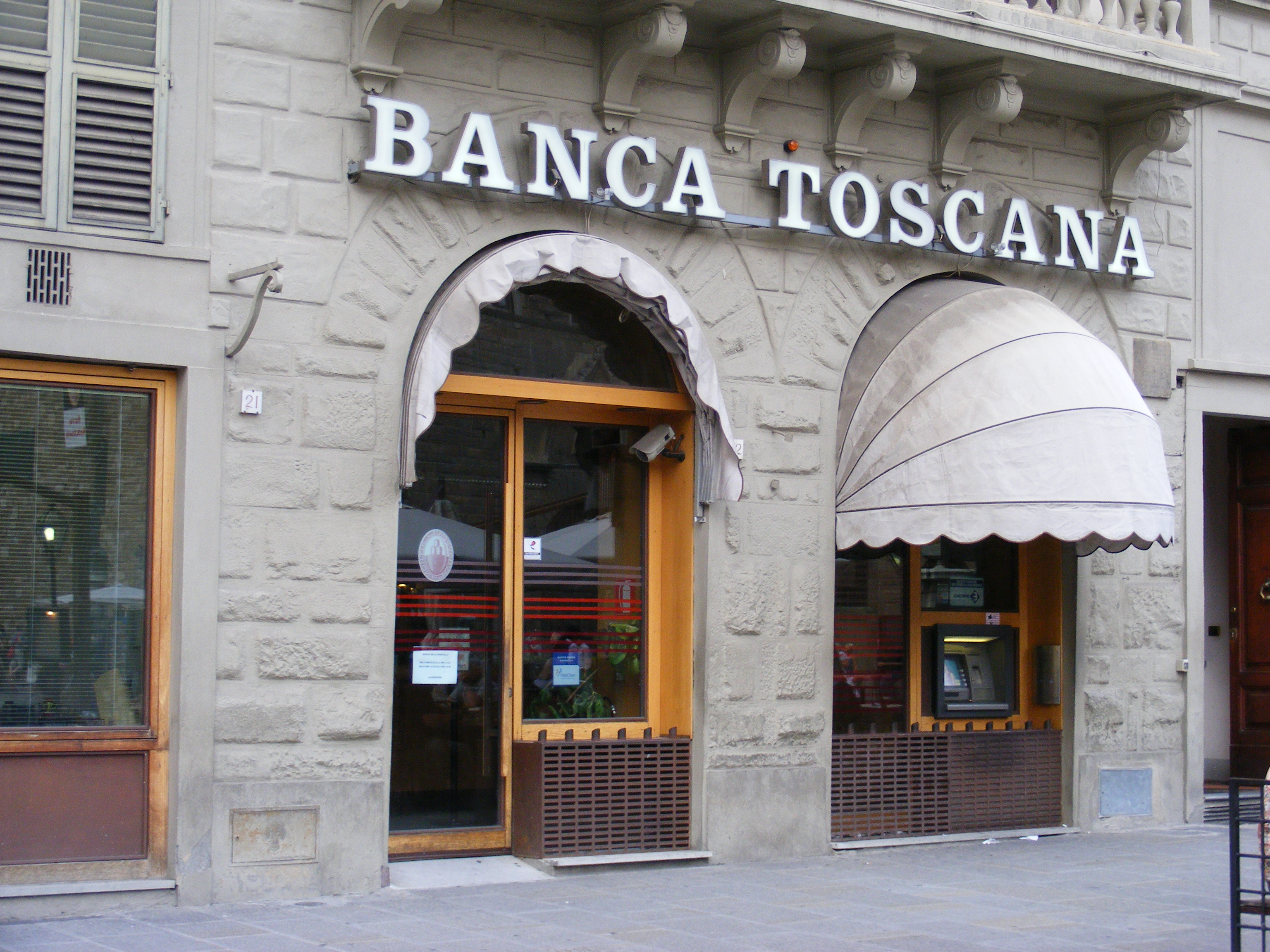 Firenze - Banca Toscana, Agenzia 1, Piazza Della Signoria,22r